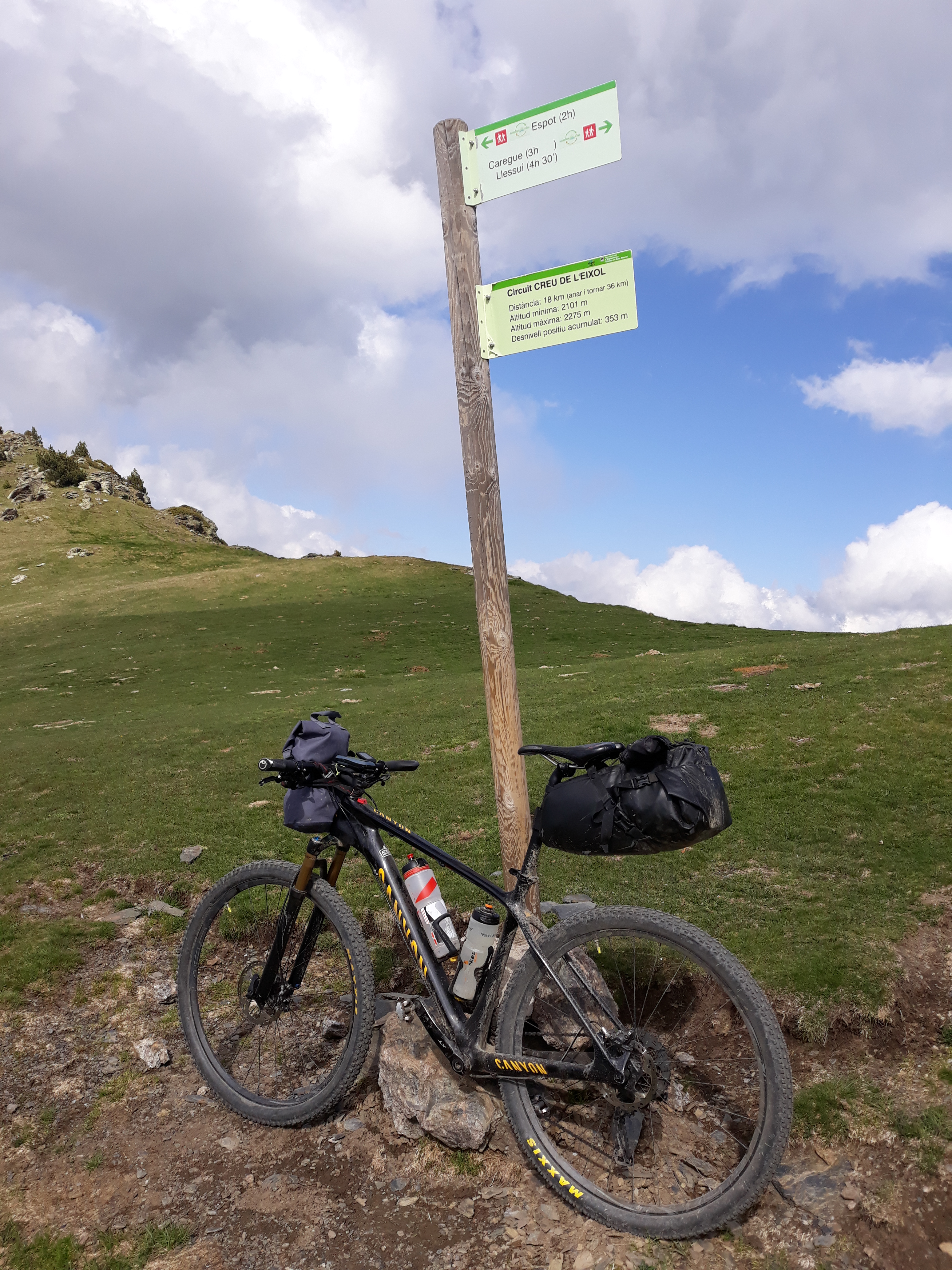 CAT700 2019